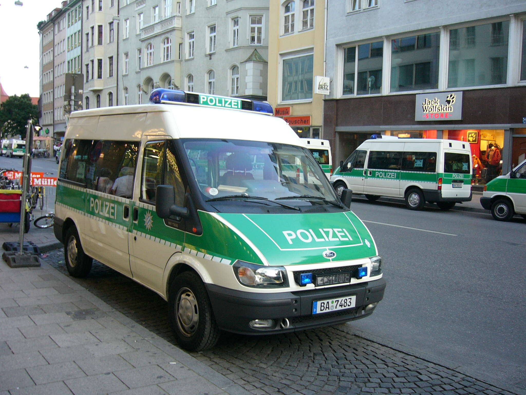 Gruppenkraftwagen (GruKw) of the Bayerische Bereitschaftspolizei, Germany